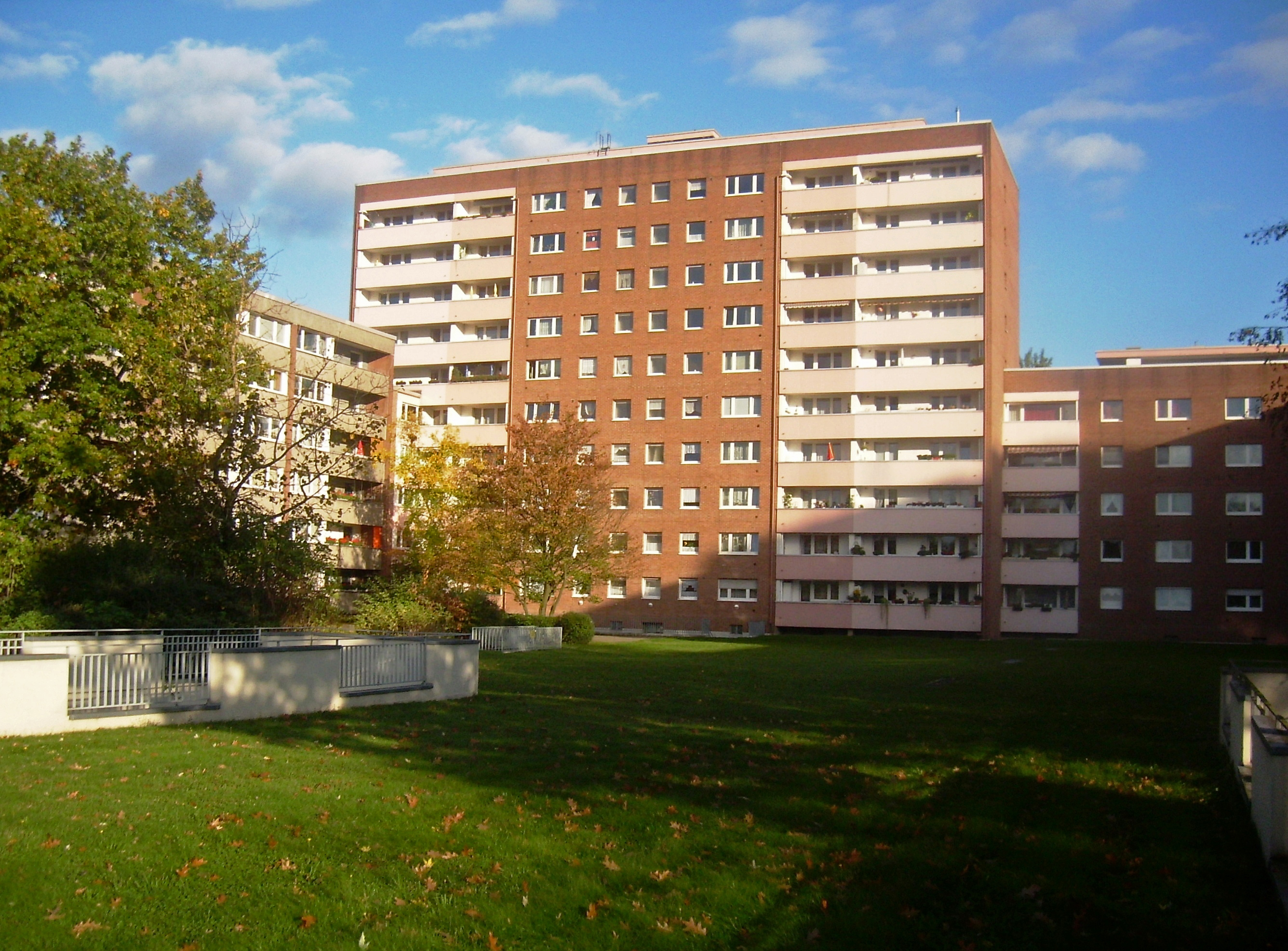 Rückseite eines Wohnhaus am Thomas-Dehler-Weg in Köln-Neubrück